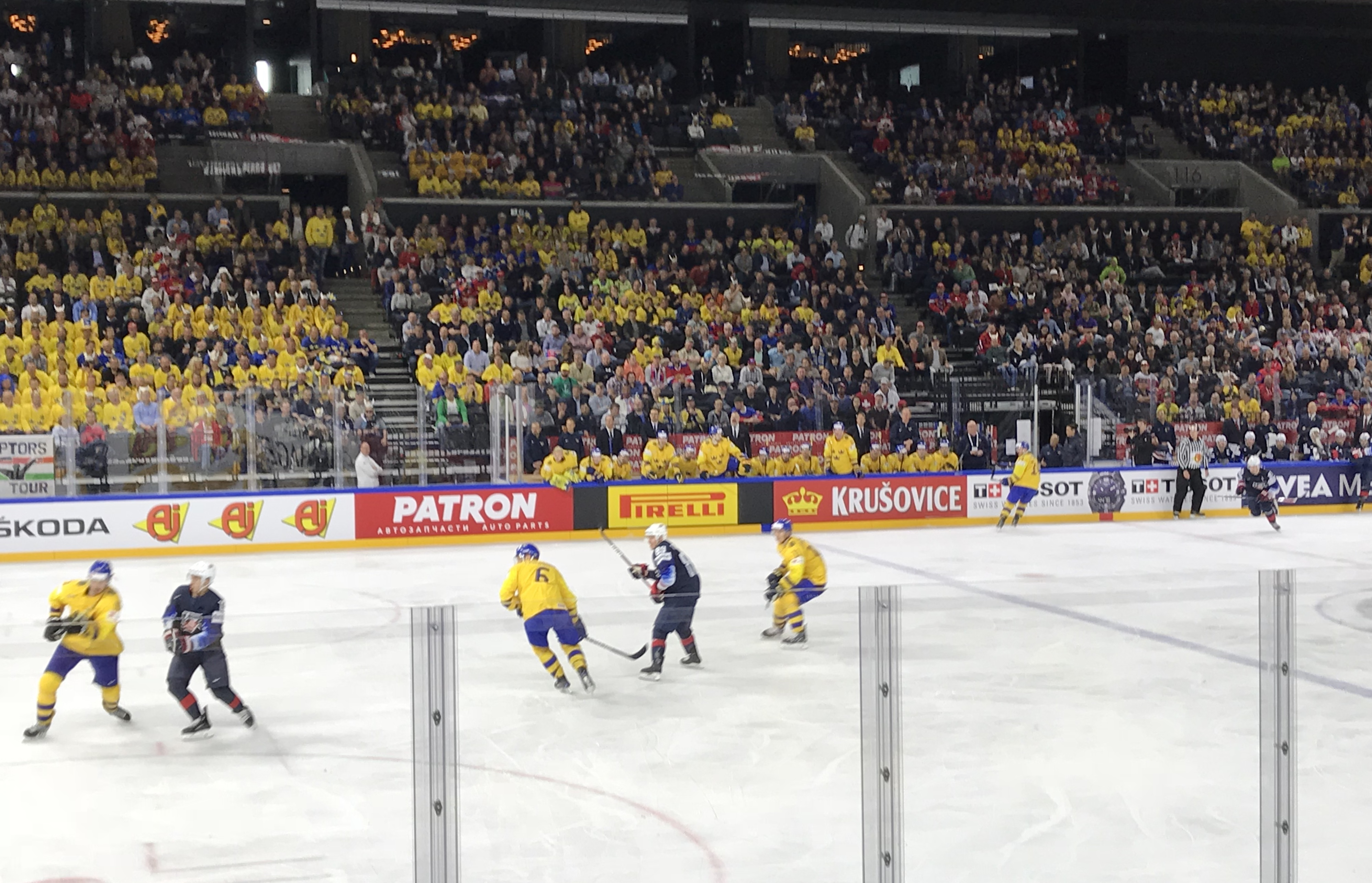 Sweden-USA at IIHF World Championship semifinal 2018